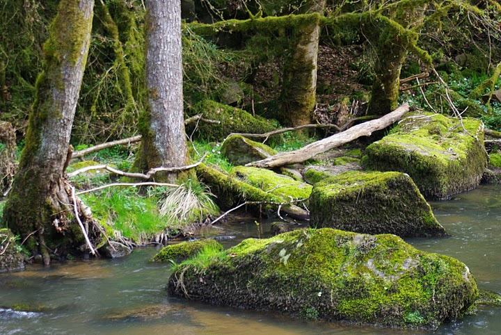 Le Miodet ou Miodex c'est selon en amont du Barrage de Sauviat, peut avant sa confluence avec la Dore.